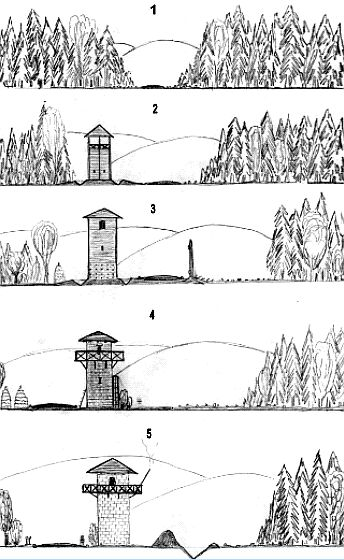 Entwicklungsphasen des römischen Limes an den nördlichen Grenzen: 1. Waldschneise mit Postenweg (1. Jahrhundert n. Chr.), 2. Holzturm mit Postenweg (frühes 2. Jahrhundert n. Chr.), 3. Holz-Steinturm mit Militärstraße und Palisade (Mitte 2. Jahrhundert), 4. Steinturm mit Mauer und Militärstraße (Raetien/Britannien, spätes 2. Jahrhundert), 5. Steinturm mit Militärstraße, Erdwall und Graben (2. bis 3. Jahrhundert).